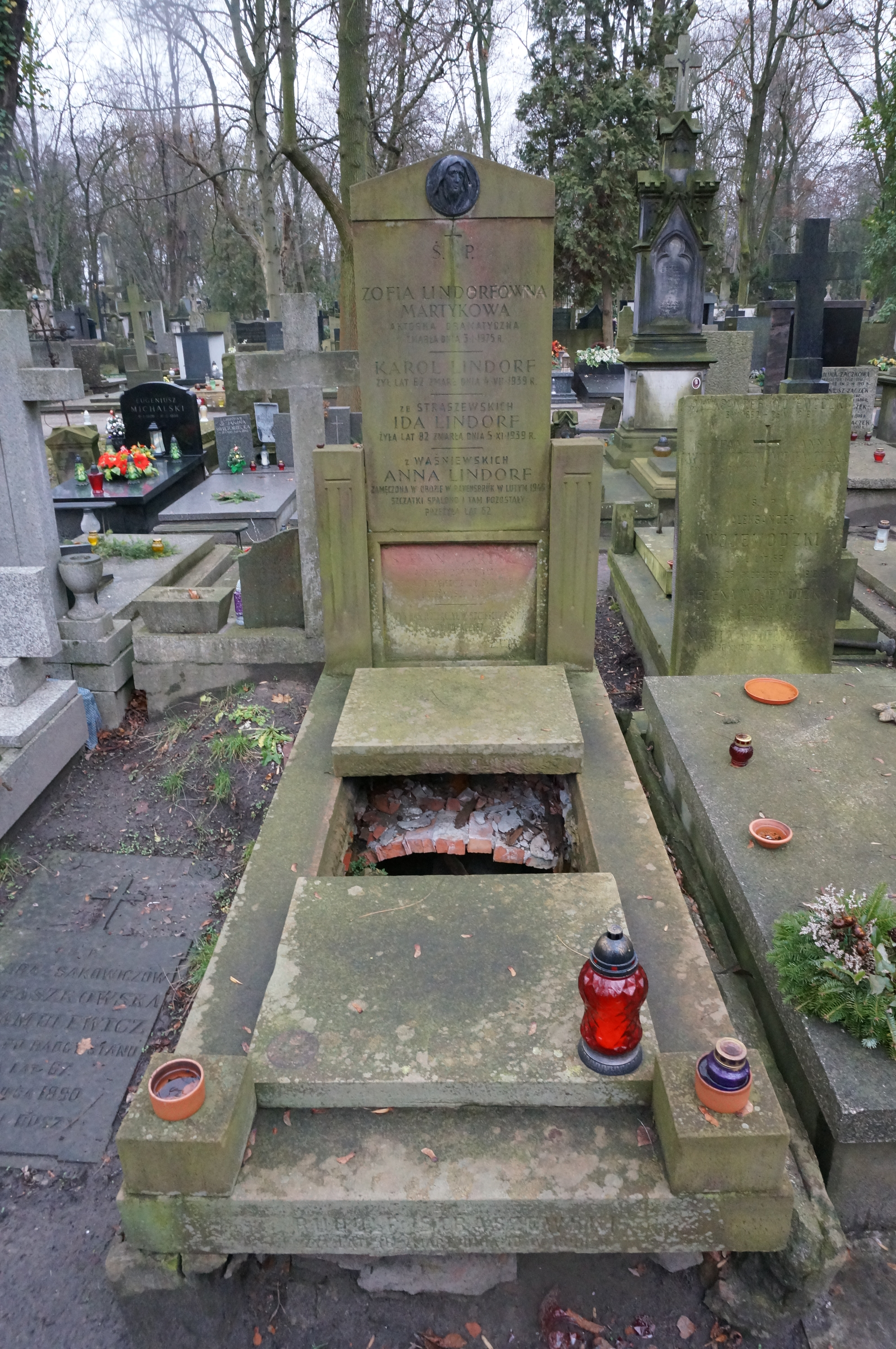 Grób Zofii Lindorfówny na Cmentarzu Powązkowskim (kwatera 53, rząd 4, grób 16)